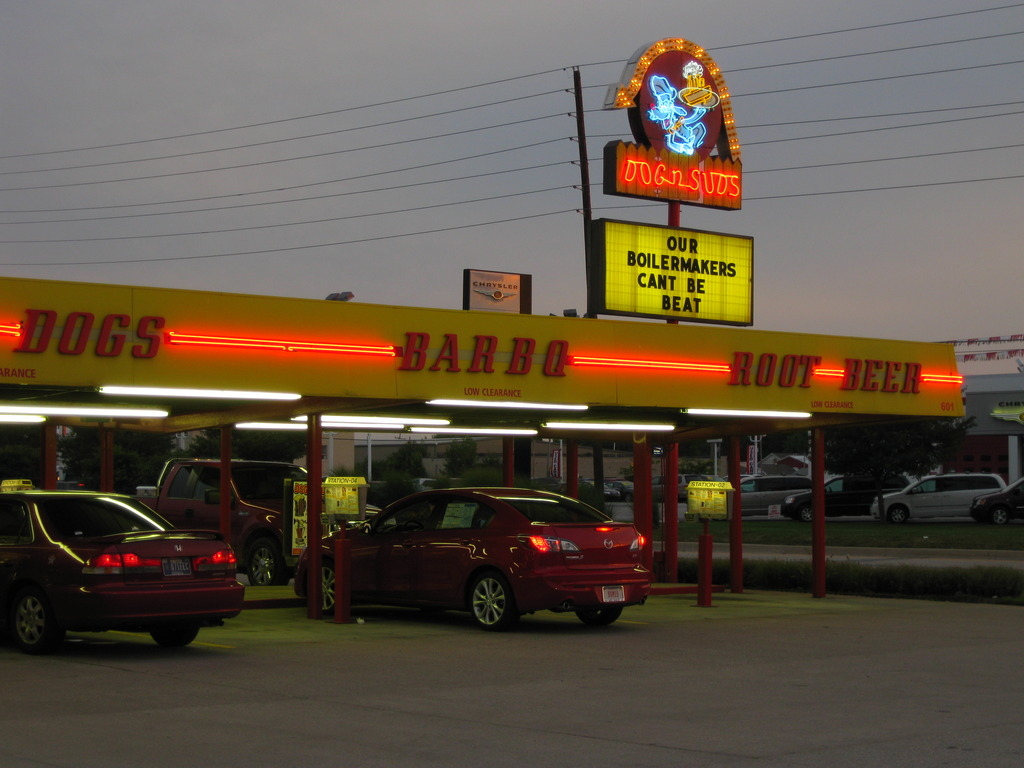 Dog n Suds drive-in diner.